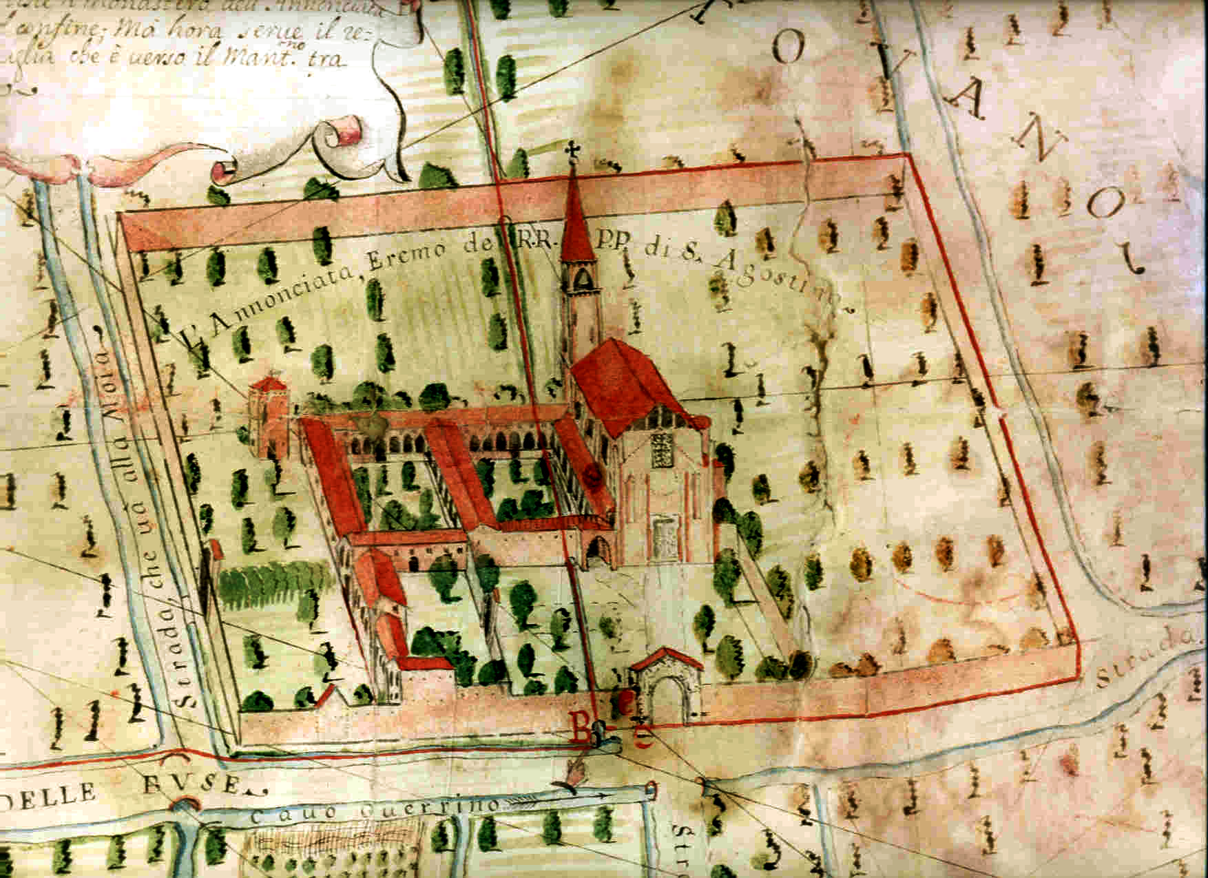 Convento dell'Annunciata Medole (Mantova). Veduta a volo d'uccello; Ingegnere Moscatelli Battaglia secolo XVIII